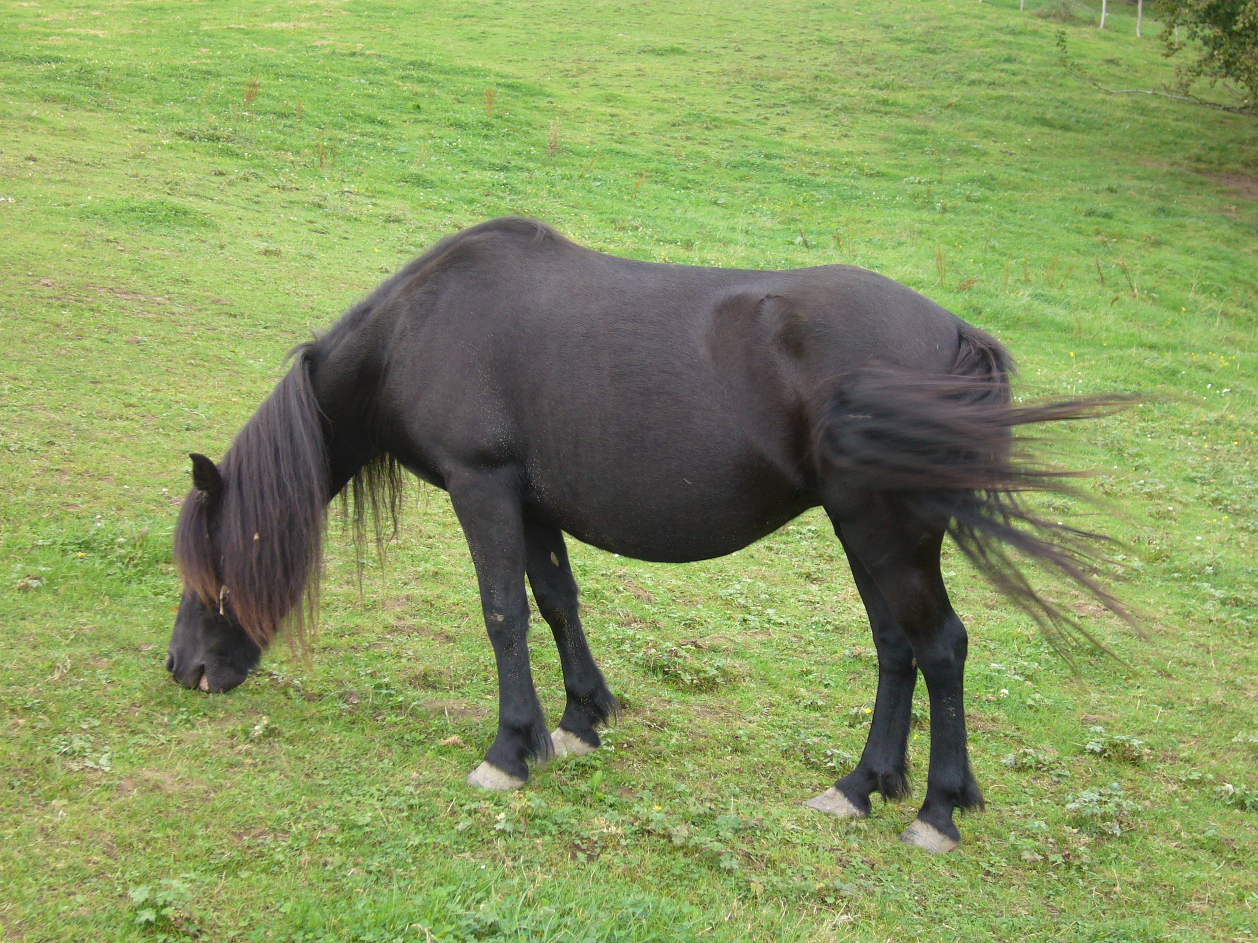 Pottoka behorra zelai batean